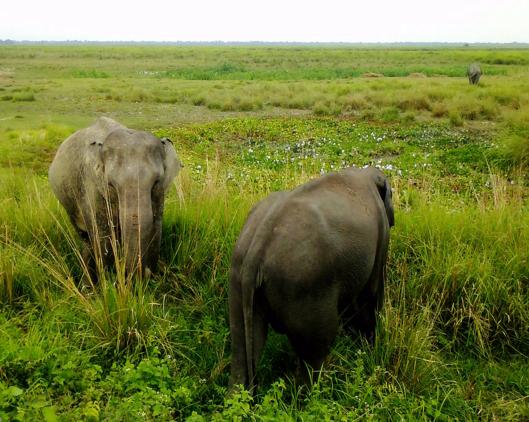 অসমীয়া: কাজিৰঙাৰ মিহিমুখ ৰেঞ্জত দুটা হাতী